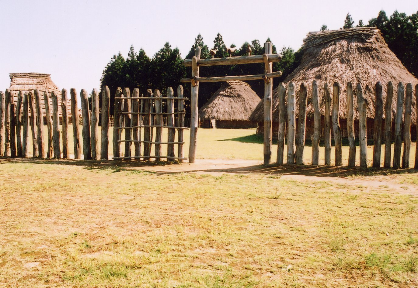 復元された地蔵田遺跡（柵で囲まれた集落）